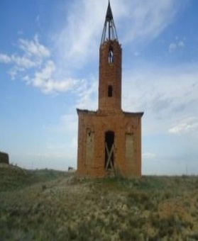 Қазақша (кирил): Исатай мешіті